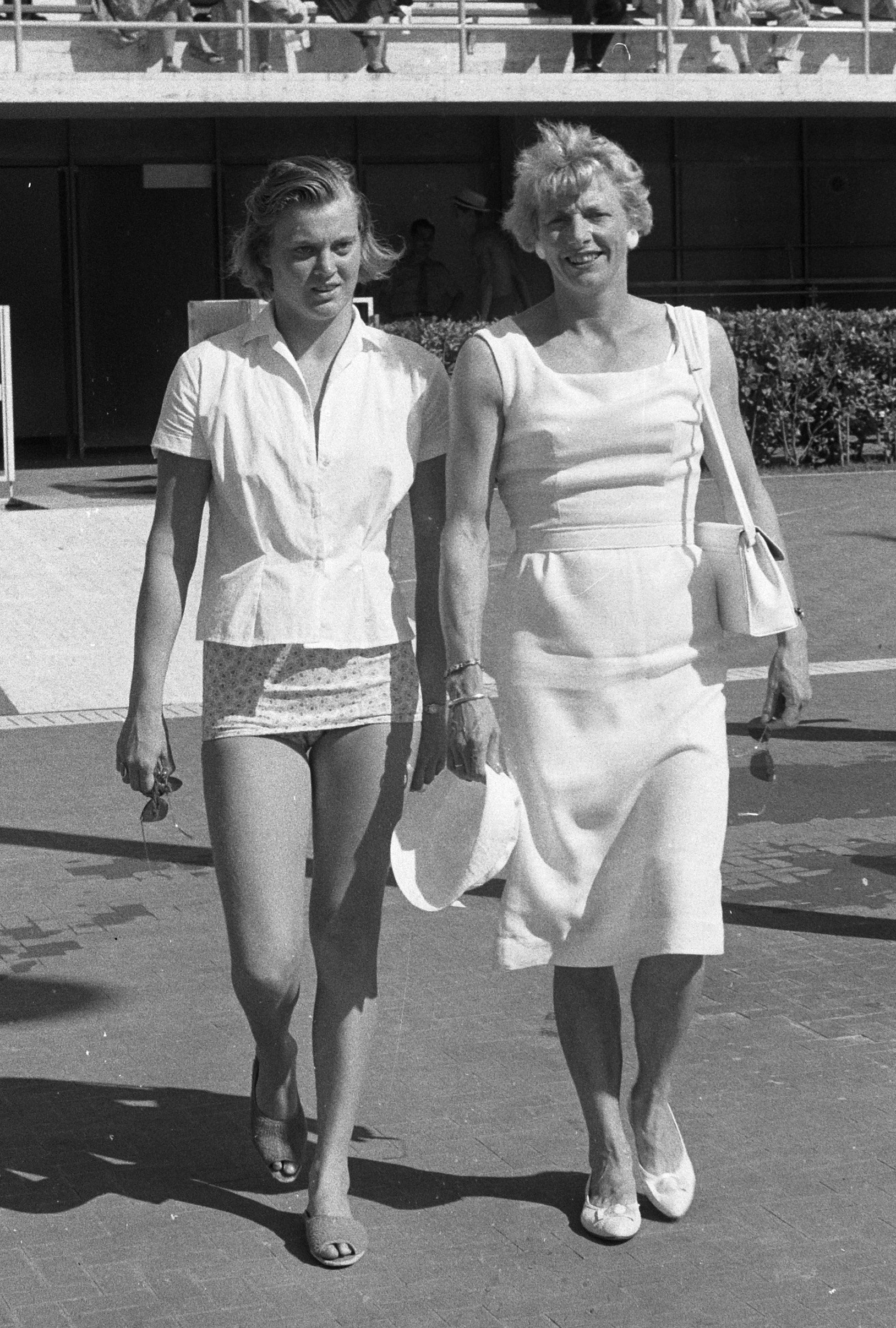 Olympische Spelen te Rome, Fanny Blankers-Koen (rechts) en zwemster Jopie Troost. Location: Italië, Rome